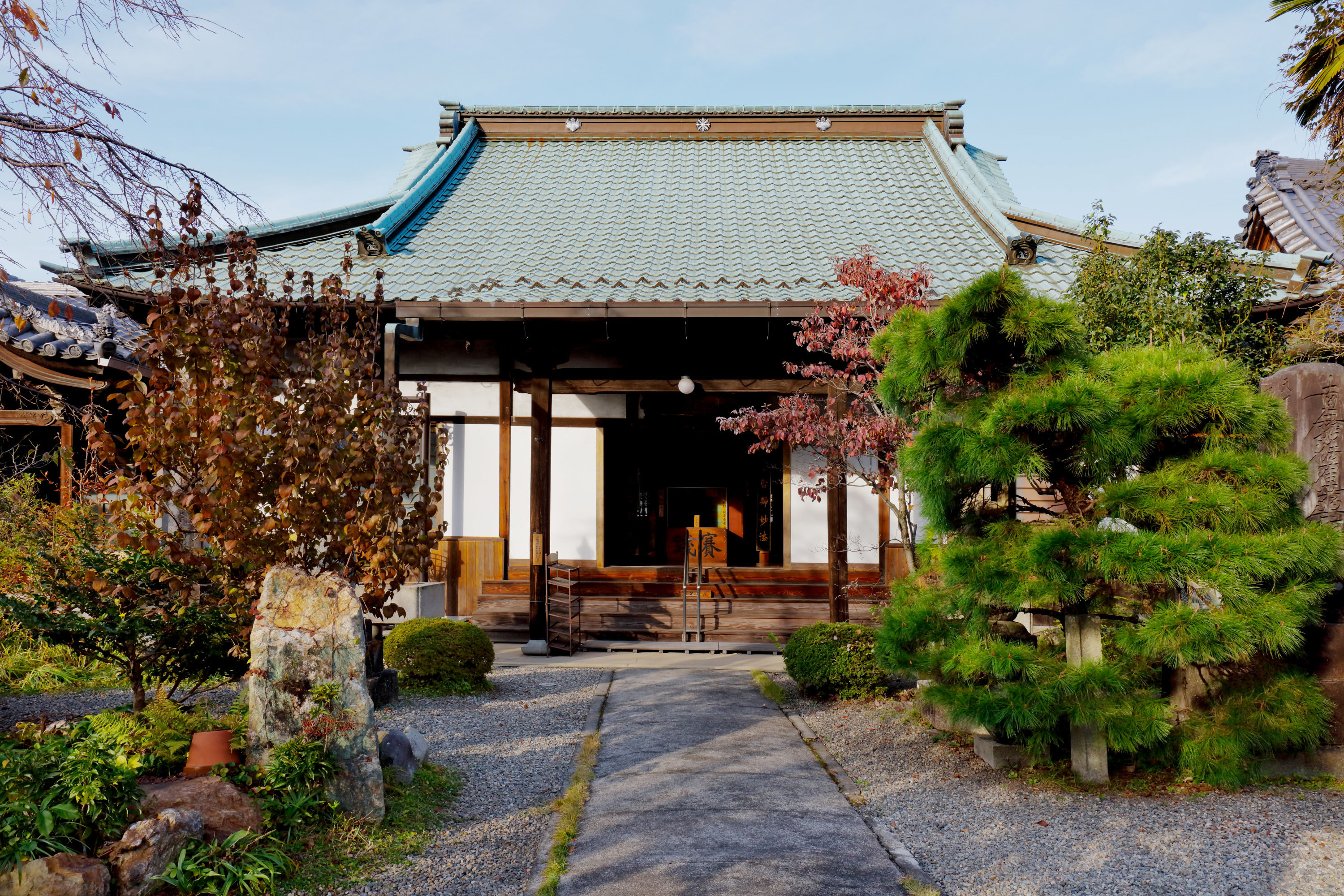 常在寺 (岐阜市)-本堂